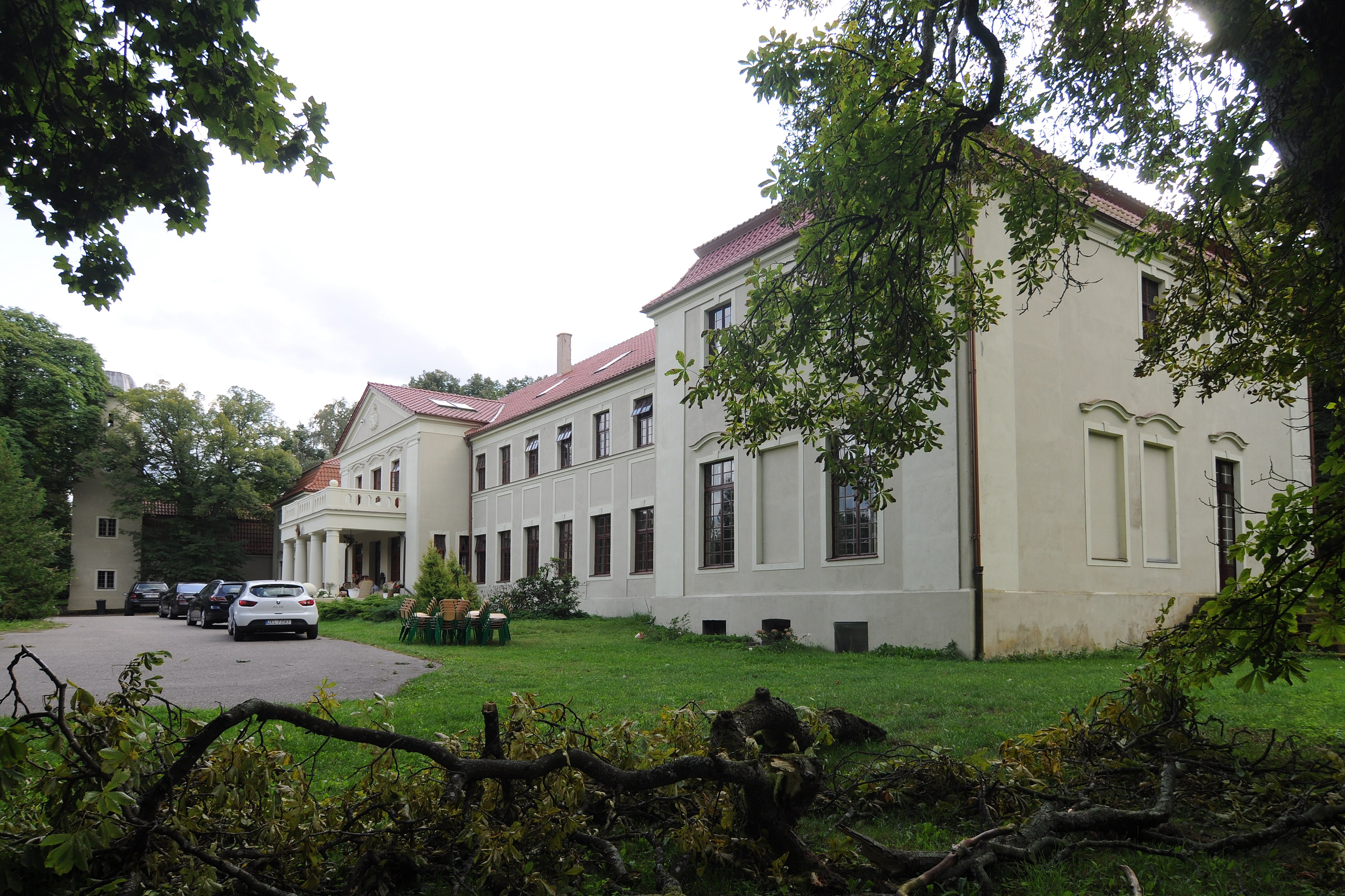 Grąbkowo, pałac, 2 poł. XIX